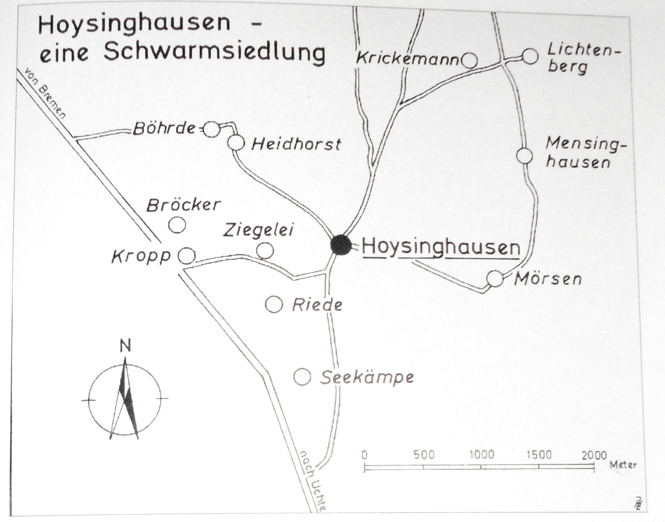 Graphik über Streusiedlung eines Dorfes